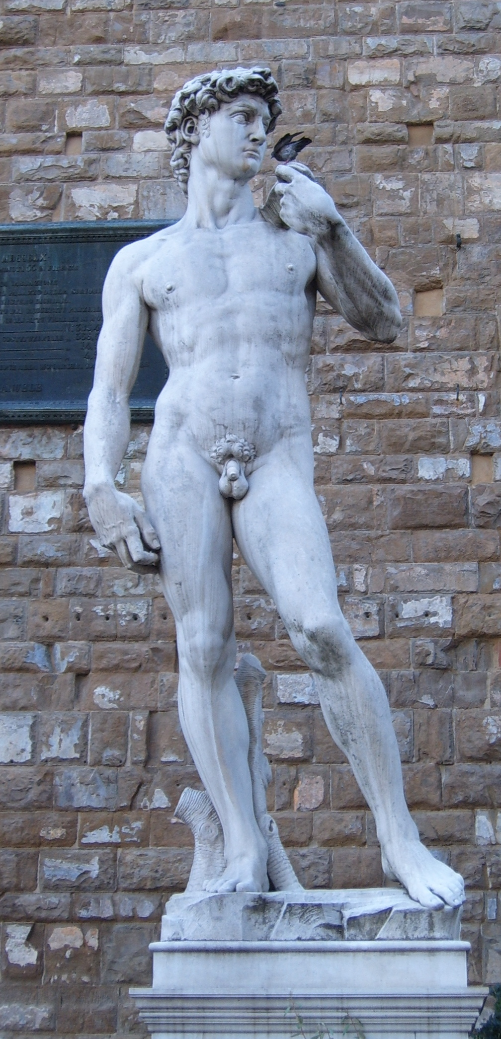 Replica of Michelangelo's David on Piazza della Signoria, Florence (Italy)